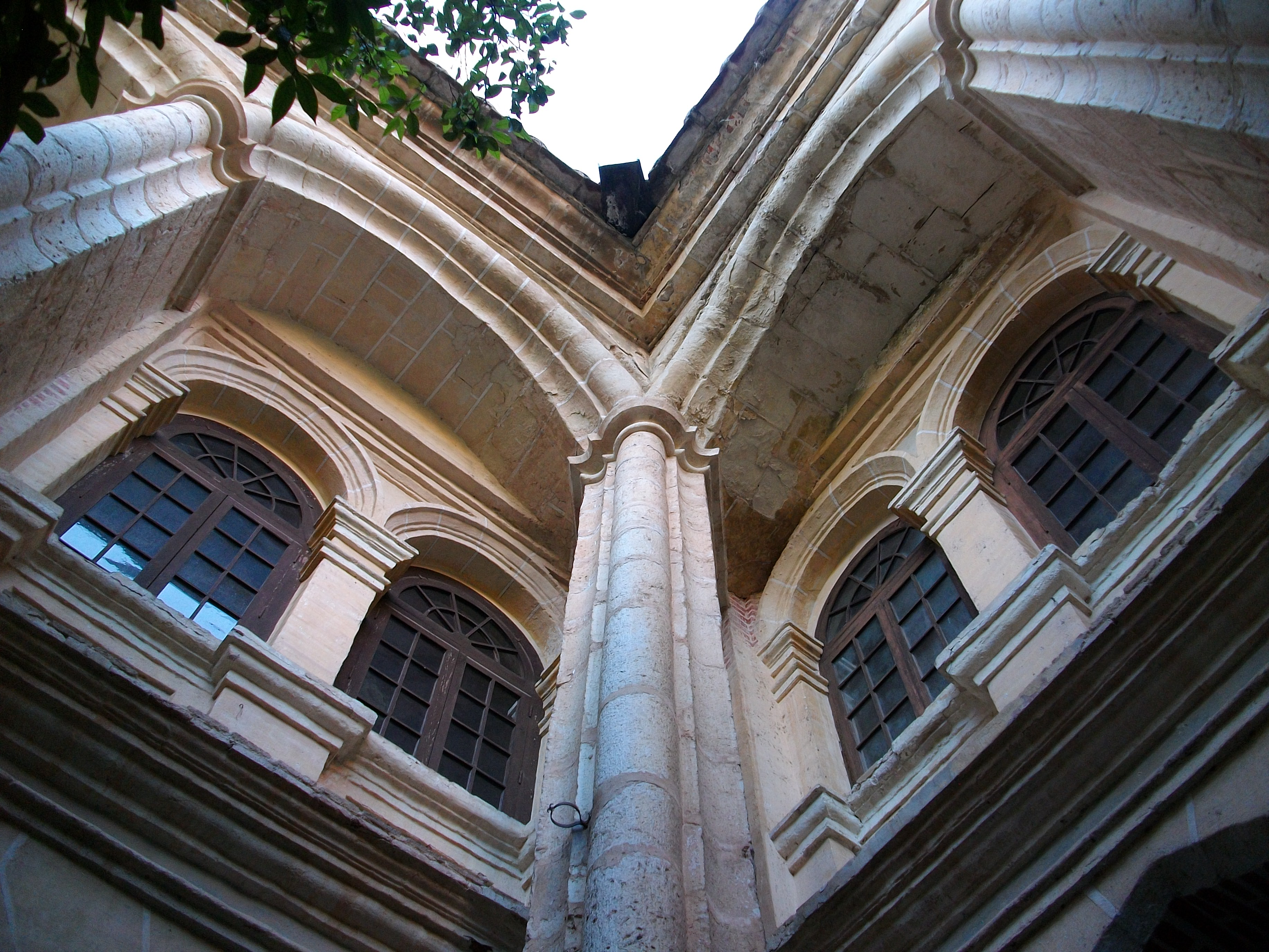 Galeria superior del clautre del monestir de Sant Jeroni de Cotalba.